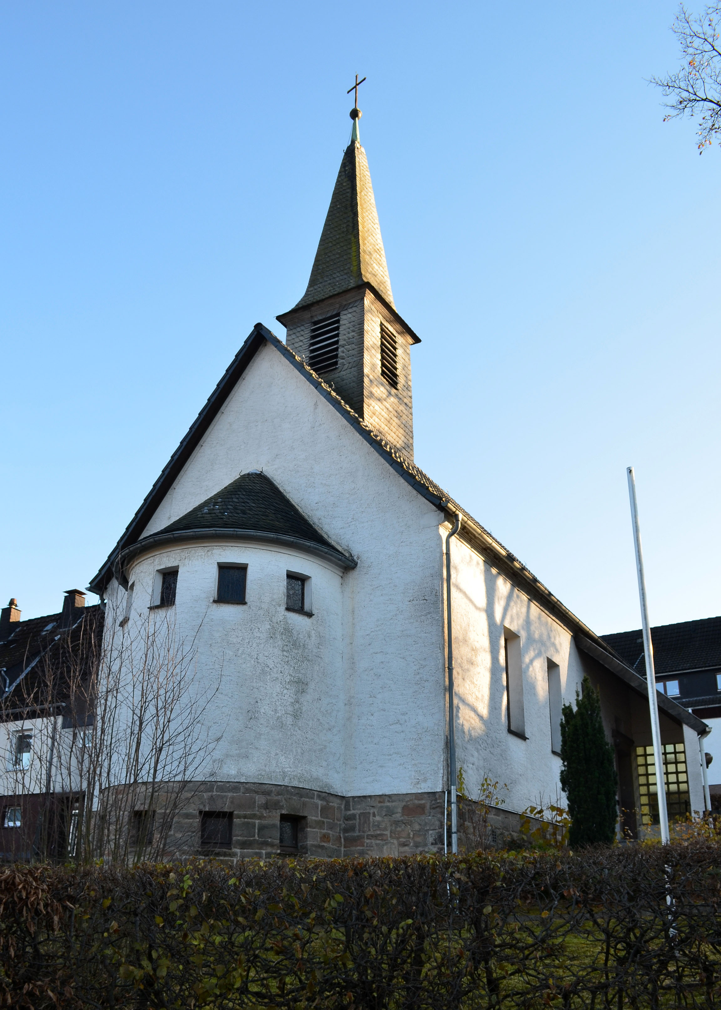 Brilon, Hoppecke, evangelische Kapelle Choransicht